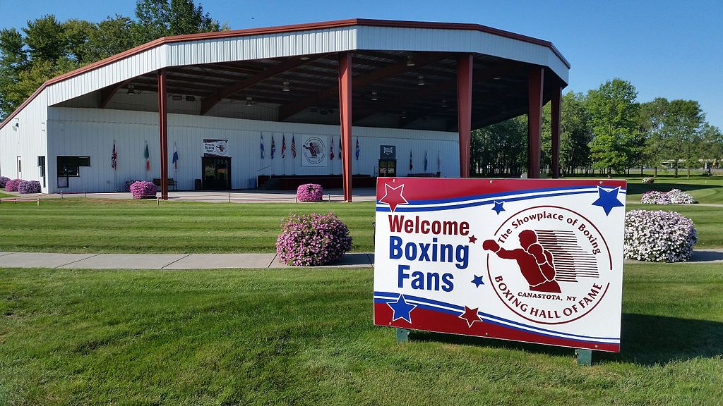 halllllllllllllllllll